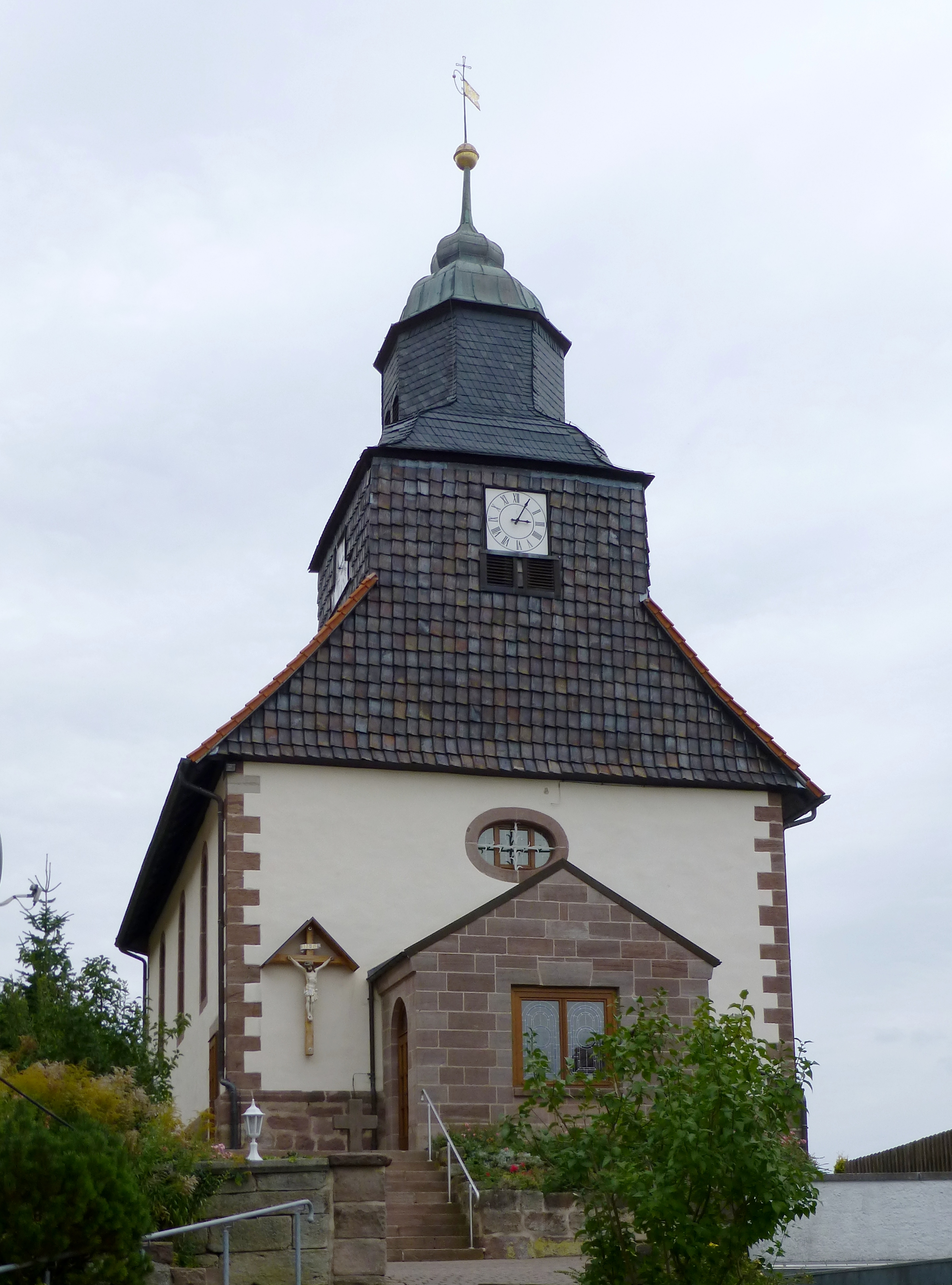 Katholische Kirche St. Ägidien in Marth, Landkreis Eichsfeld. Inschriftlich datiert 1732